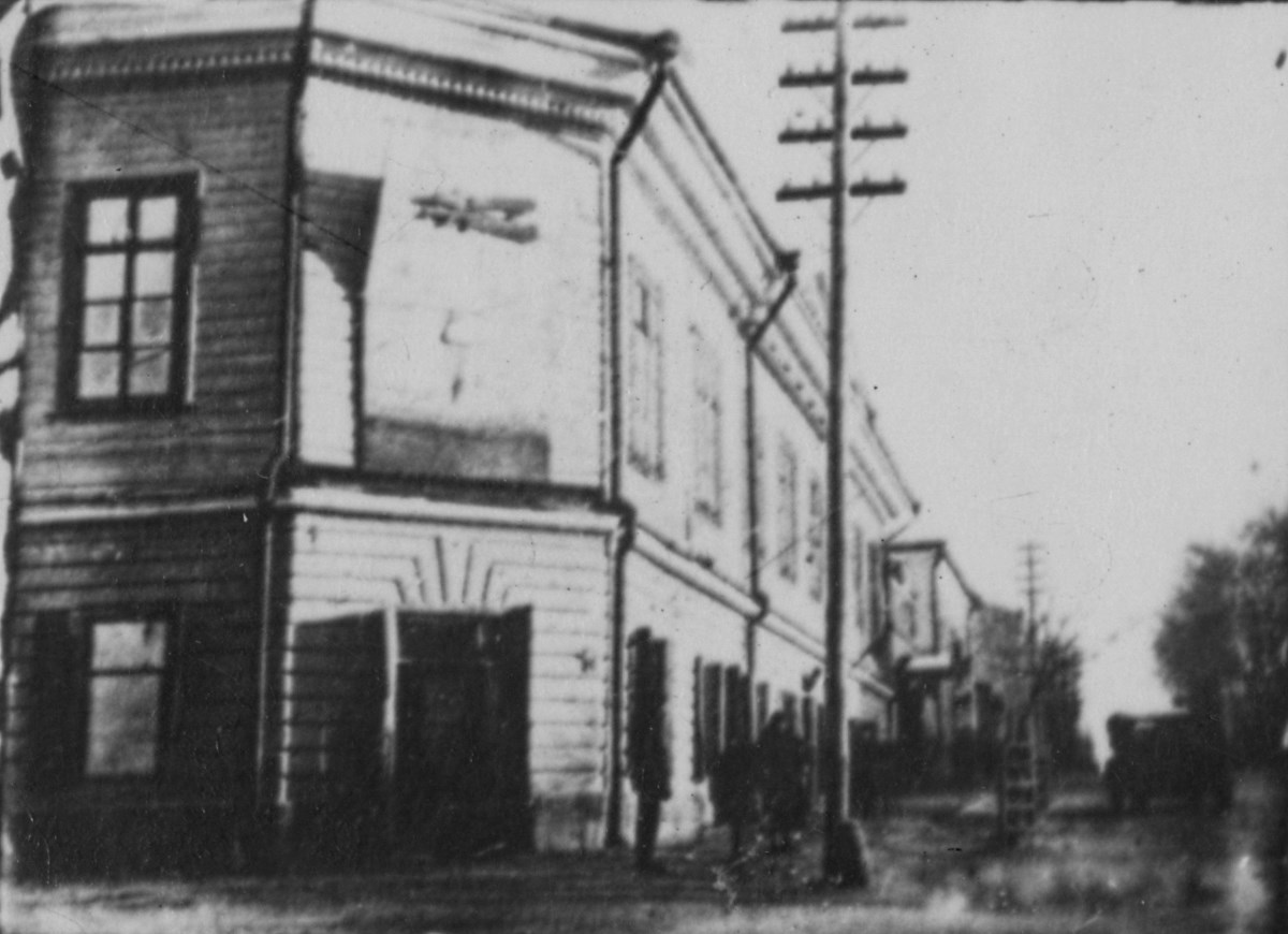 Беларуская (тарашкевіца): Магілёў (Mahiloŭ), рог вуліц Шклоўскай (vulica Škłoŭskaja) і Шляхецкай (vulica Šlachieckaja)